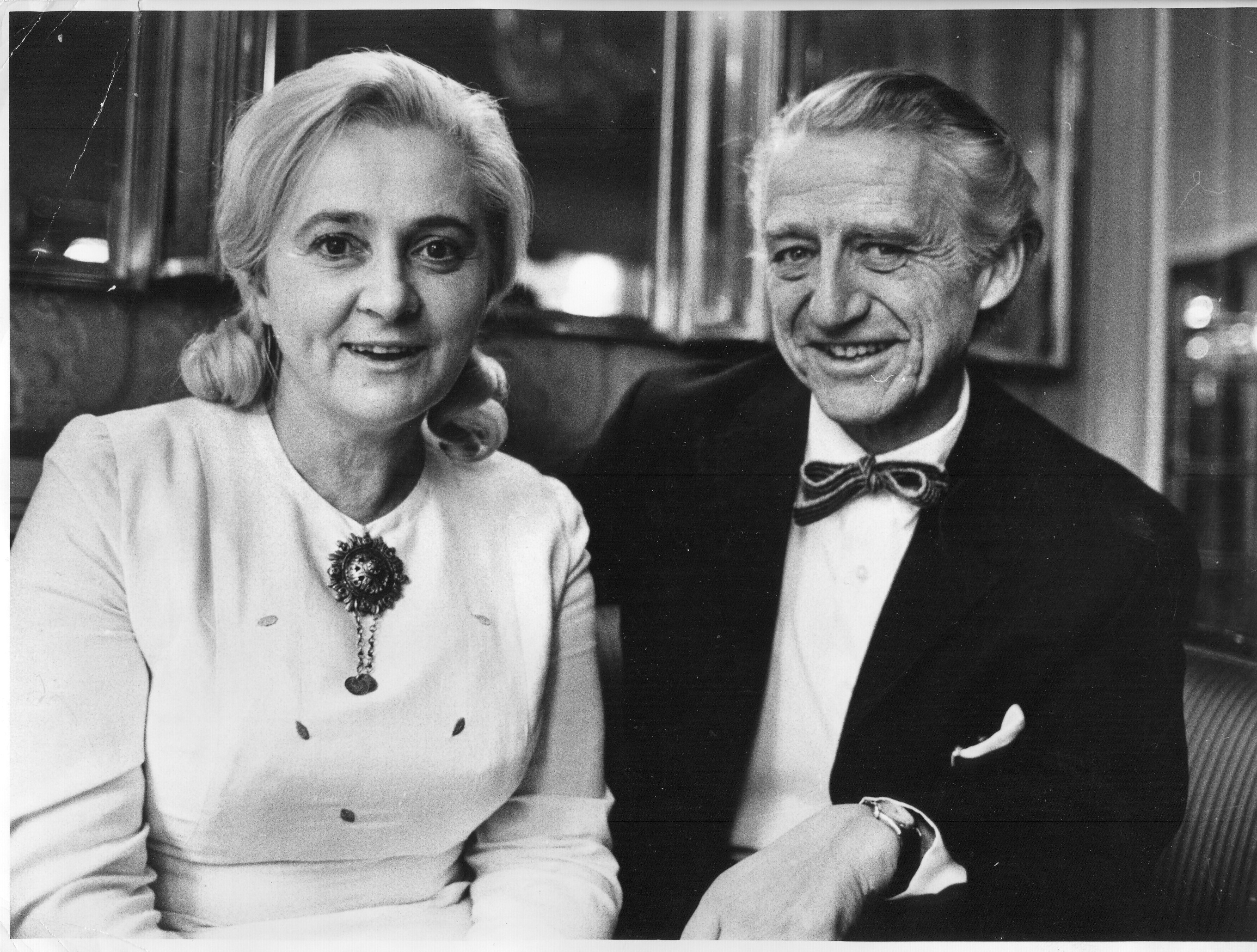 Мира Алечковић и норвешки краљ Улаф, Осло, 1975. године. Уступио Срђа Николић, син Мире Алечковић.